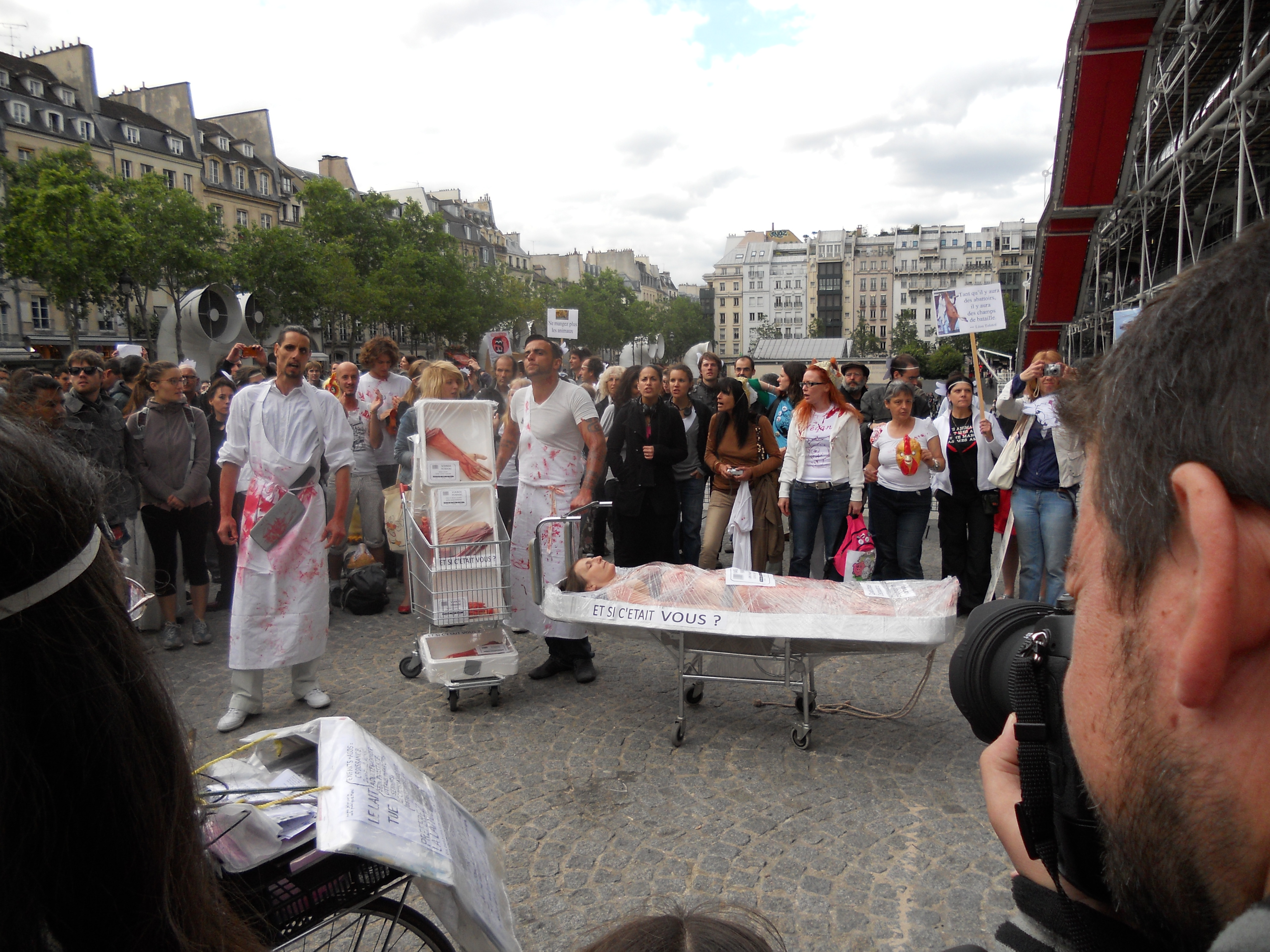 Veggie Pride Paris 2011